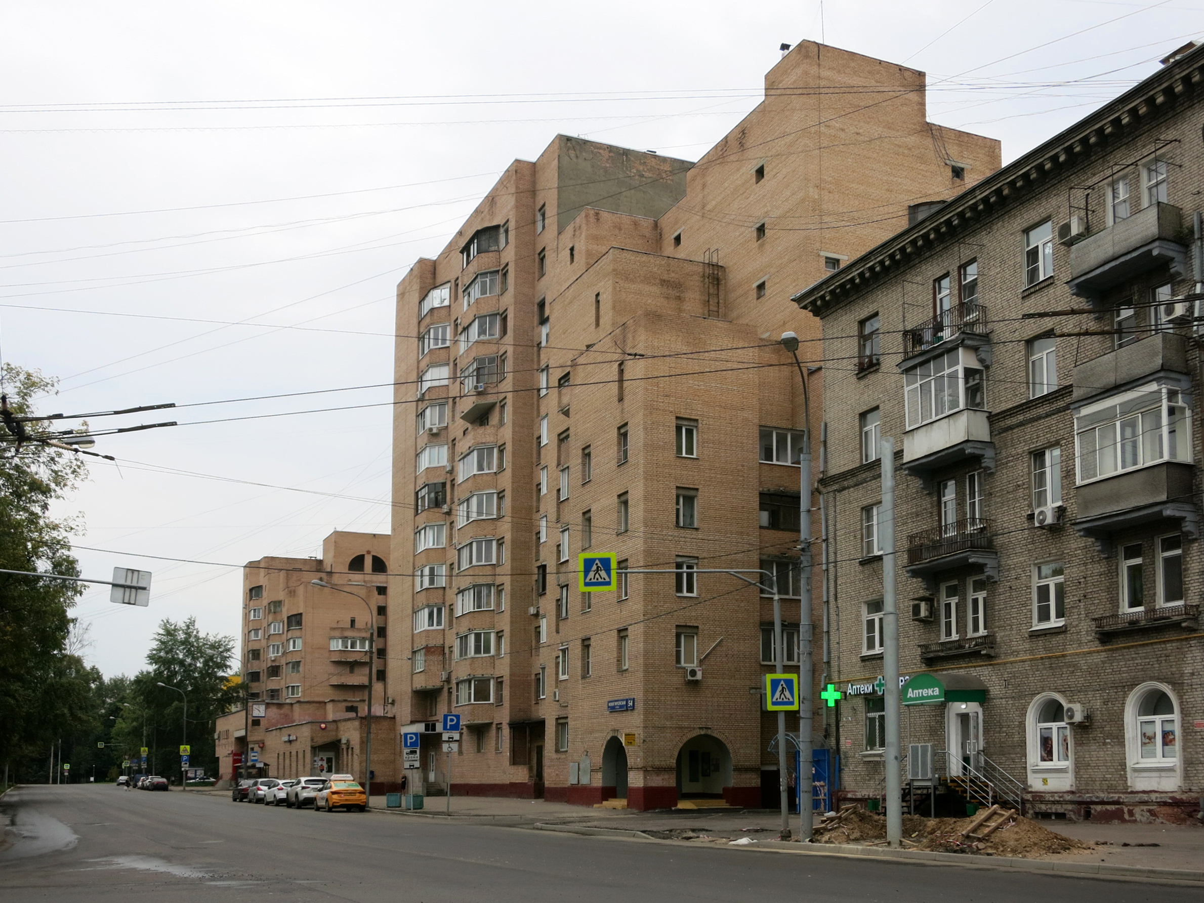 Новогиреевская ул., д. 54. Семиподъездный жилой дом, в наиболее высокой части имеет 16 этажей. Построен по индивидуальному проекту в 1990 году. На переднем плане справа — дом 52.